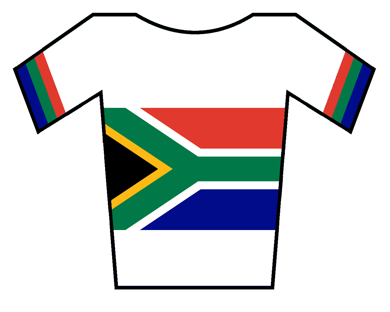 Maillot de Sudáfrica